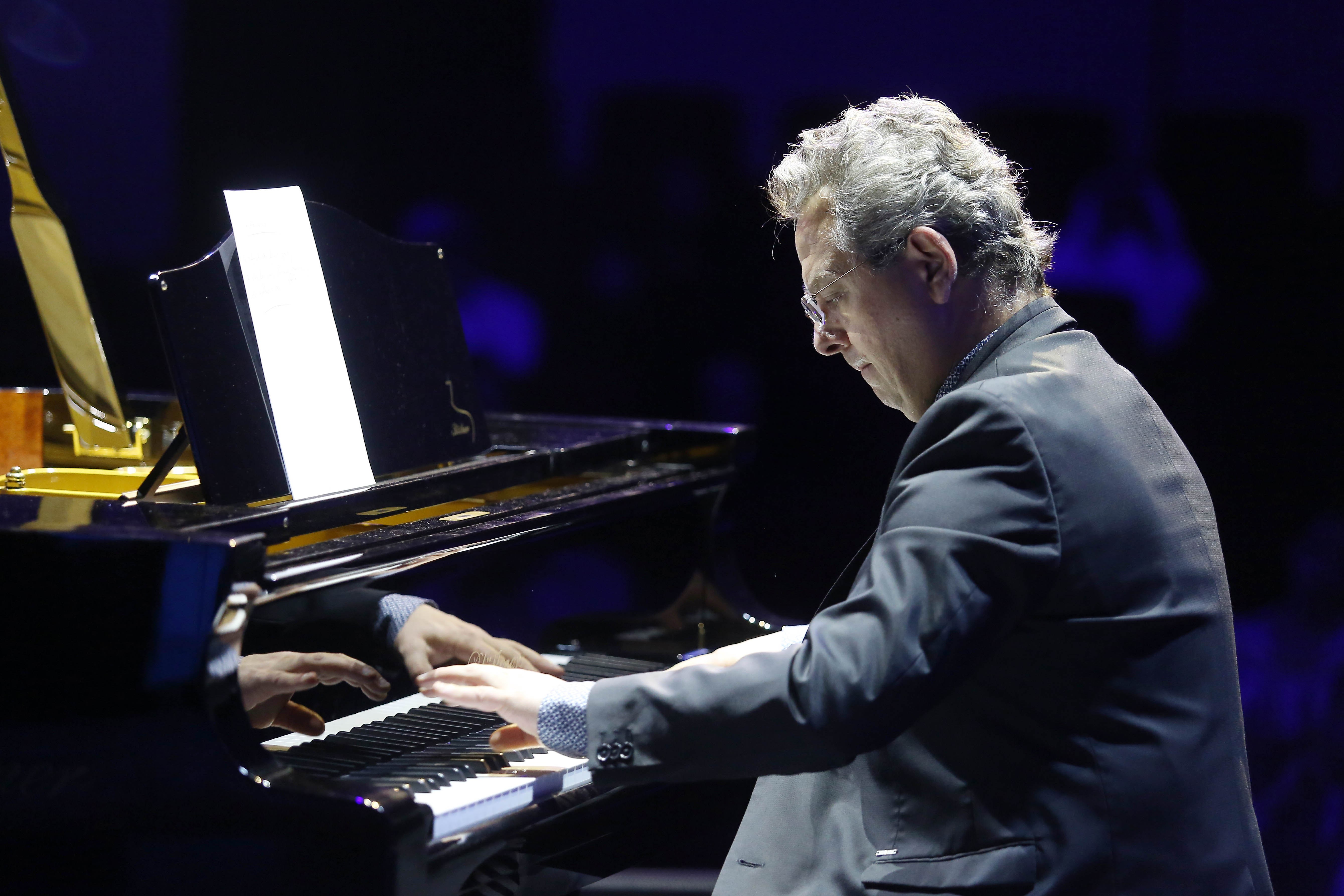 Récital Dubaï